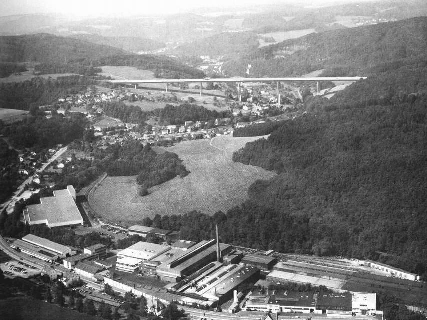 Weiershagen: Wiehltalbrücke und Firmengelände des Edelstahlwerks Kind & Co. im Vordergrund